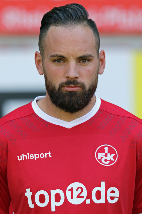 Giuliano Modica